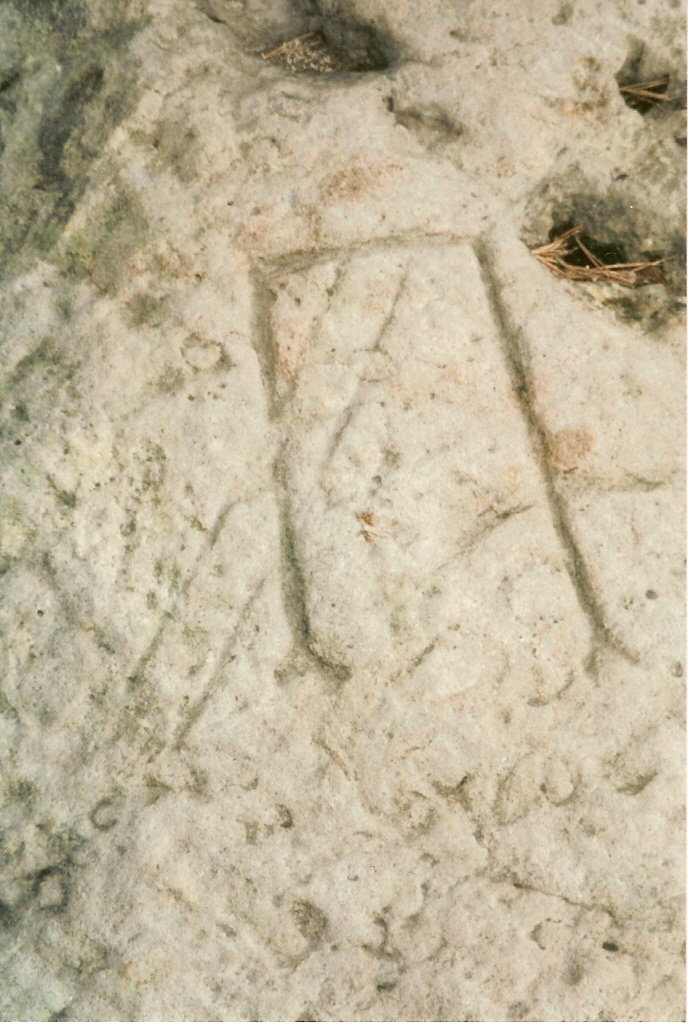 Felszeichen Galgen Wüstung Warnsdorf